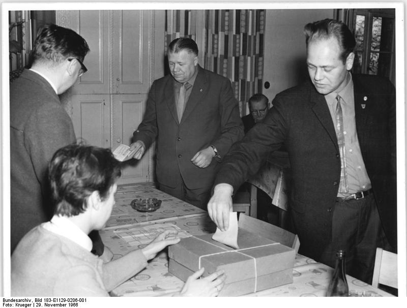 LPG Müncheberg, Wahl einer Parteileitung Zentralbild Krueger Krue-At. 29.11.1966 LPG Müncheberg wählt neue Parteileitung Die Genossen der LPG "Prof.Dr.Rübensam" in Müncheberg, Kreis Strausberg wählten am 27.11.1966 auf ihrer Wahlberichtsversammlung ihre neue Parteileitung. Hier gibt Parteisekretär Paul Fallmer seine Stimme ab und LPG Vorsitzender Otto Krei nimmt den Wahlschein entgegen.